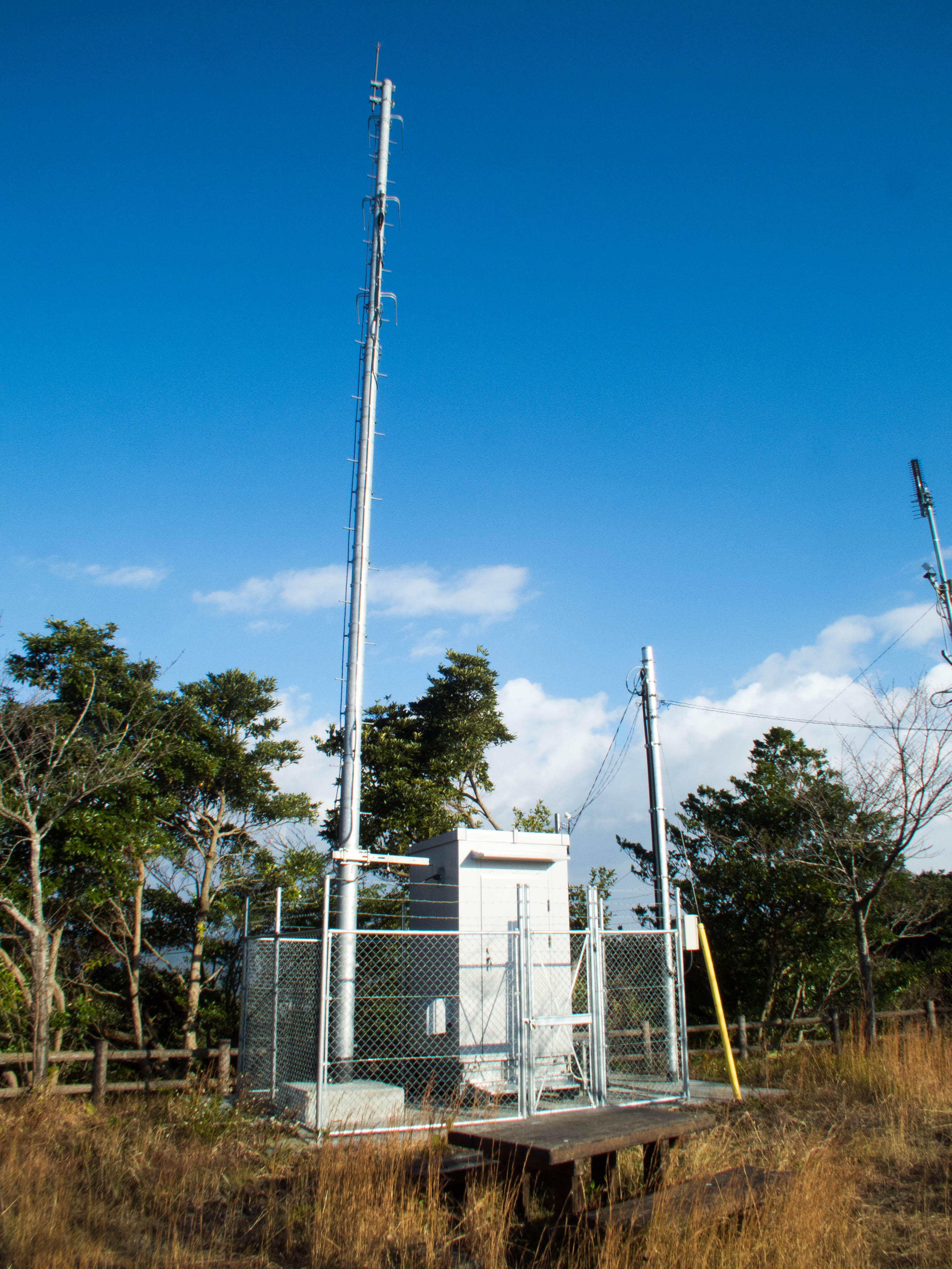 JOZZ0BZ-FM Base station